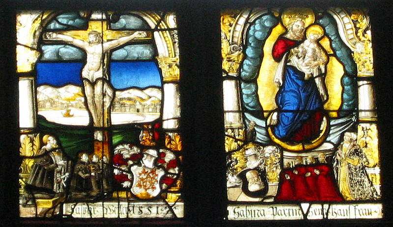 Glasfenster in der Gautinger Pfarrkirche St. Benedikt